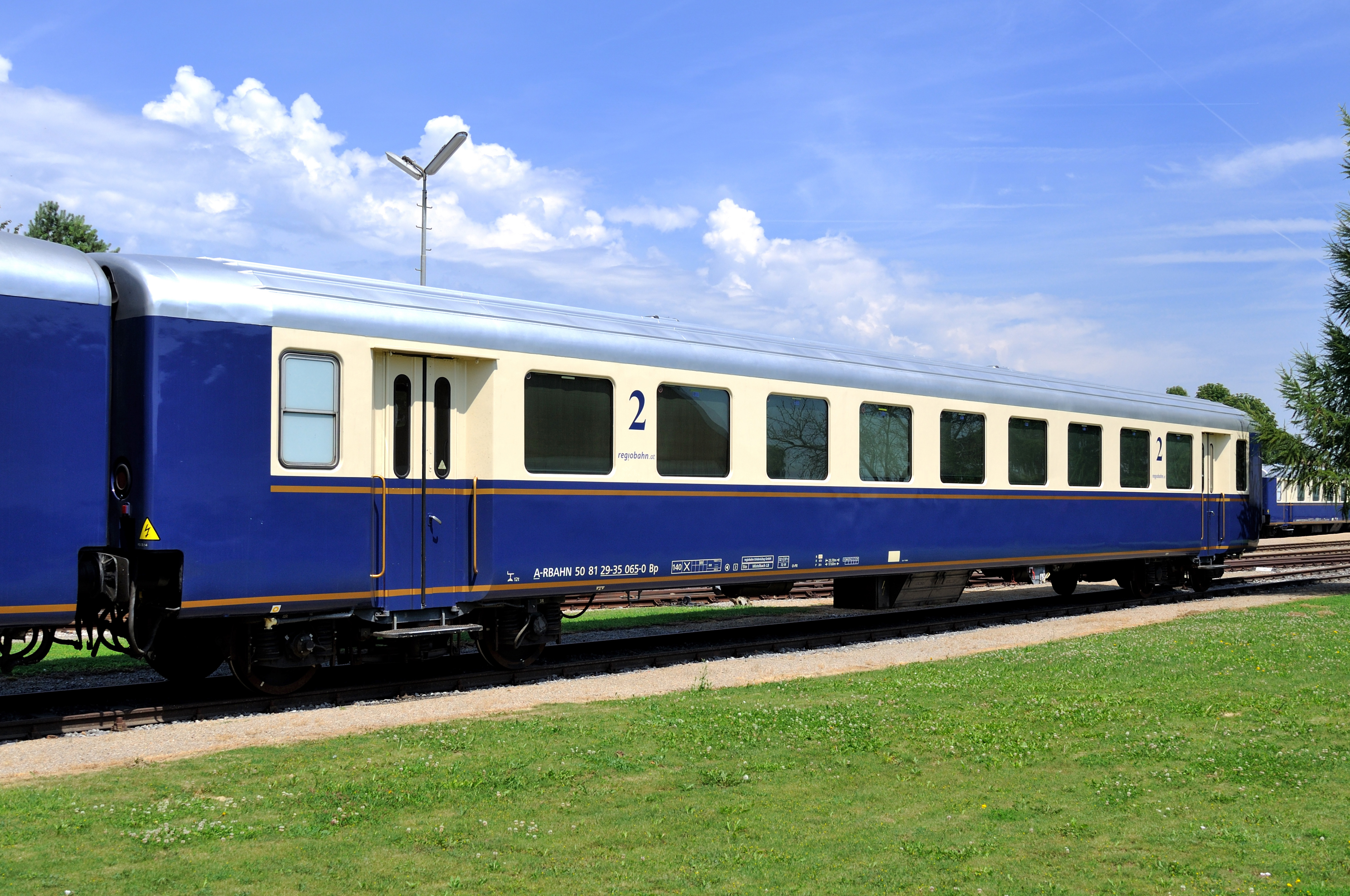 Bp 29-35 065-0 (Regiobahn-Lackierung) am Bahnhof Ernstbrunn